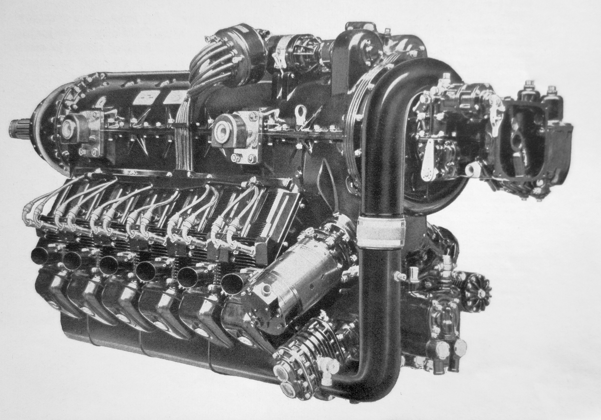 Walter Minor 12 I-MR